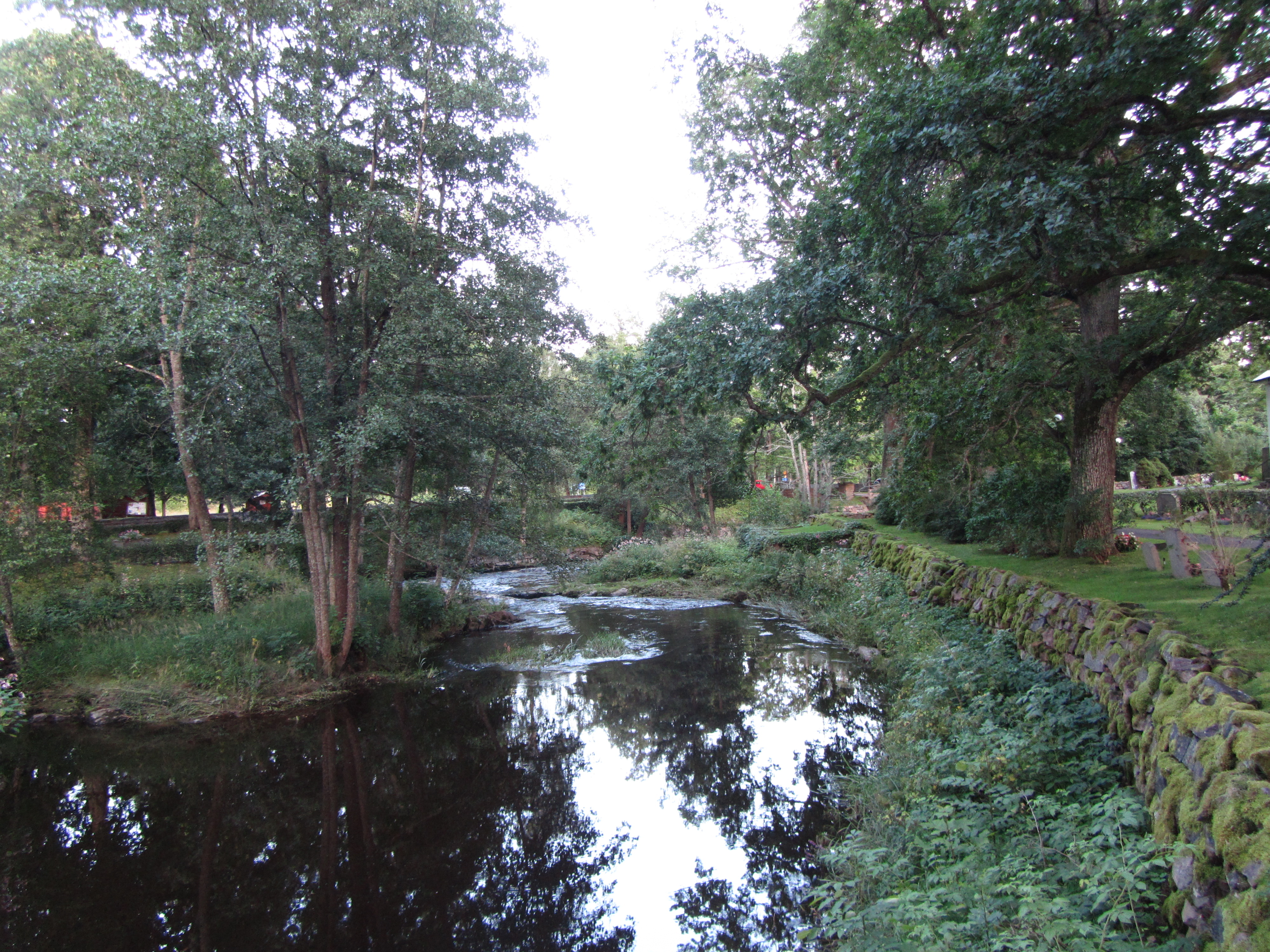 Ån Glumman vid Väse kyrka och kyrkogård i södra Värmland öster om Karlstad.